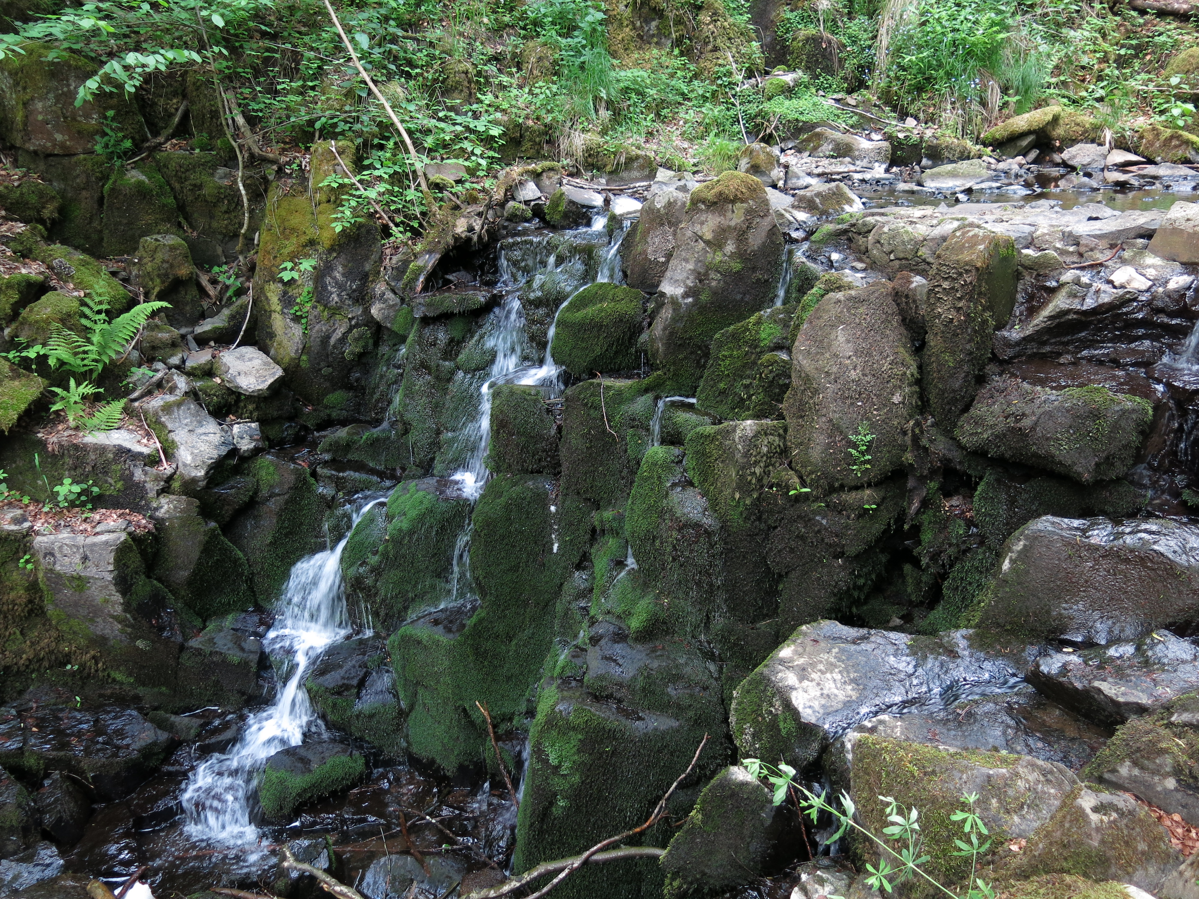 Wasserfall Teufelsmühle am Holzberg oberhalb von Bischofsheim